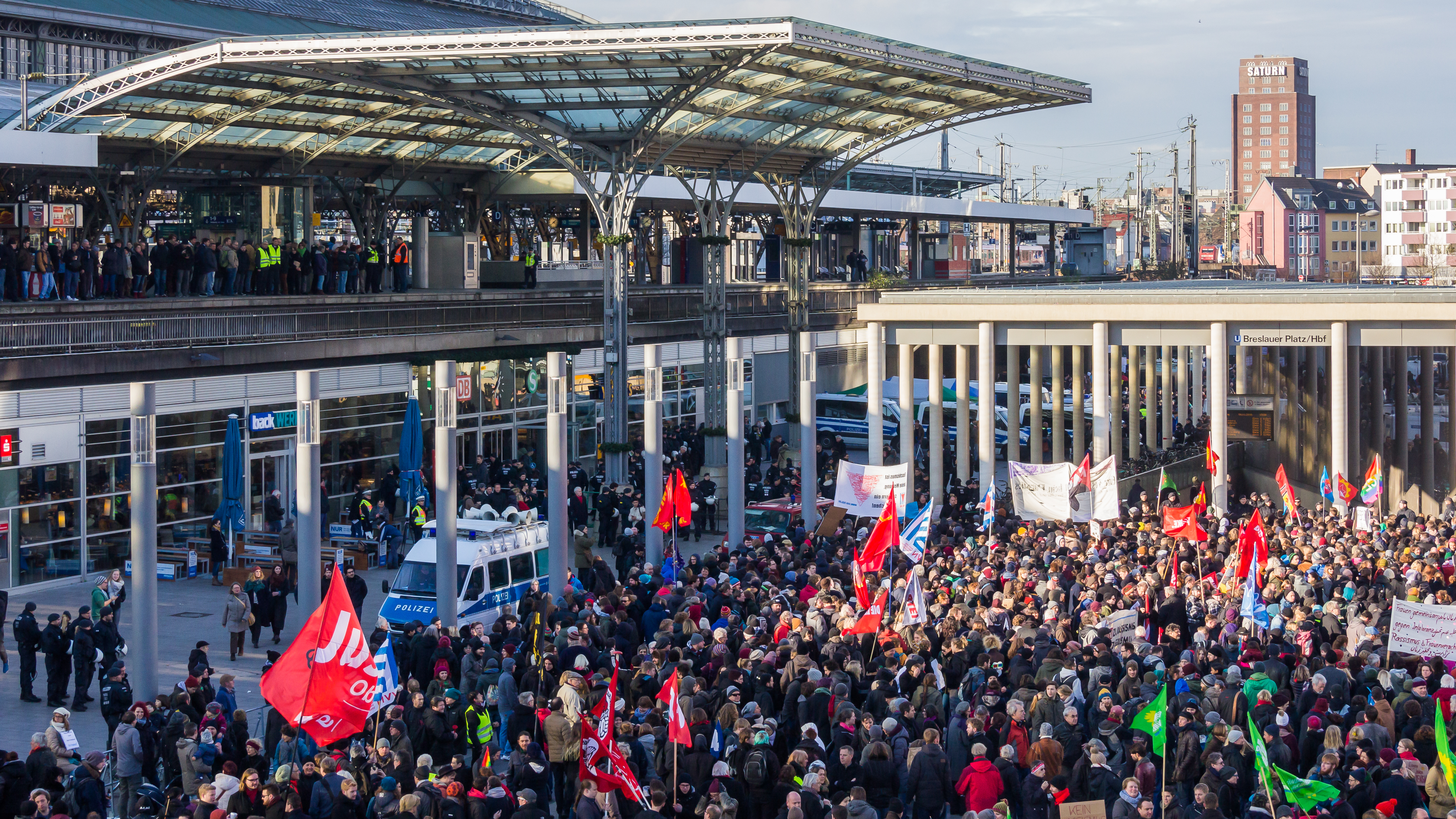 Gegendemonstration „Köln gegen Rechts“ (Hashtag: #nopedianrw ) auf dem Breslauer Platz (südlicher Teil) zur Pegida-Demonstration auf dem Breslauer Platz (nördlicher Teil)